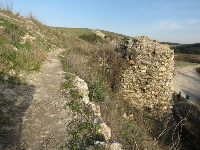 صورة قرية